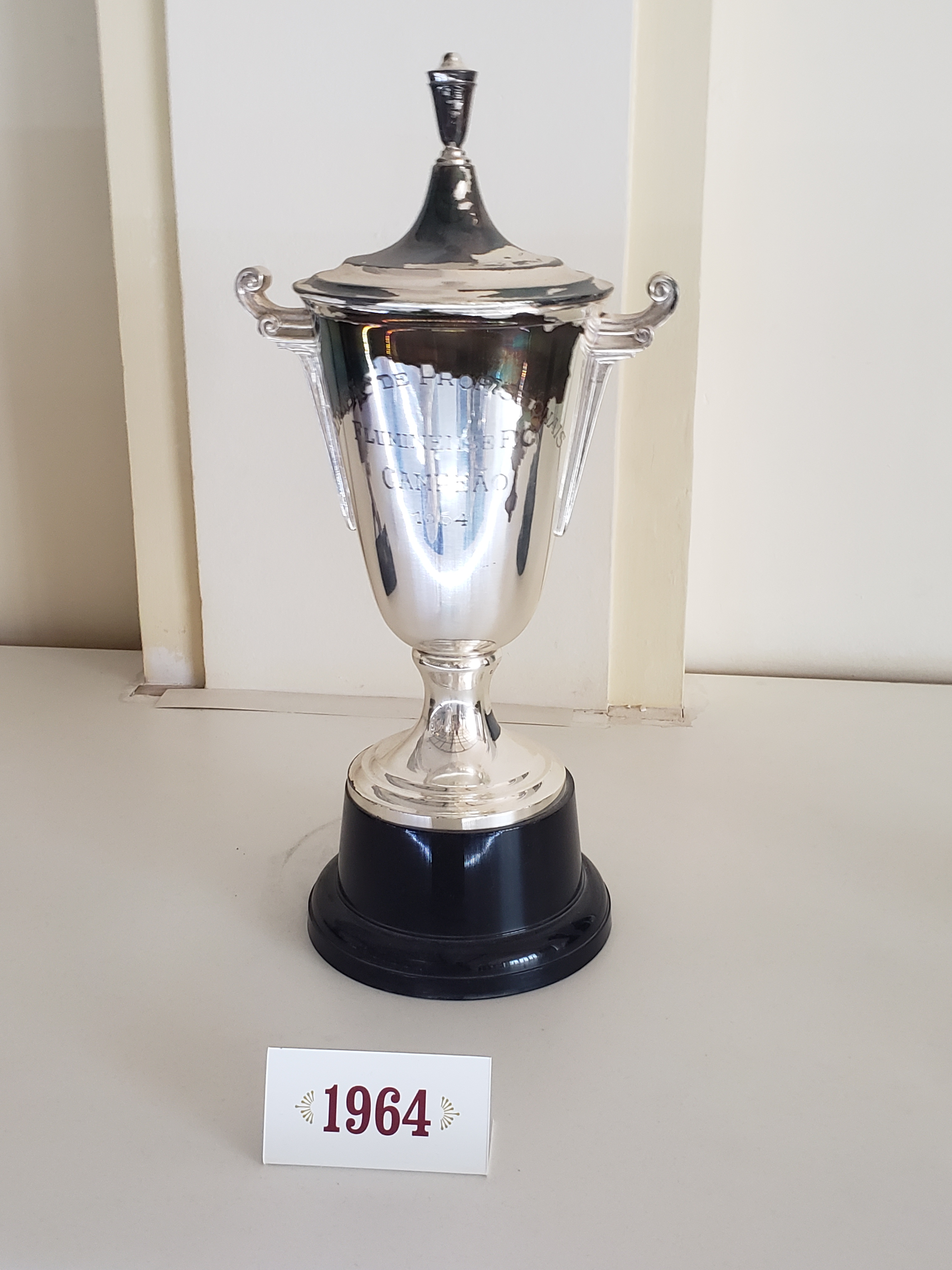 Taça do Campeonato Carioca de Futebol de 1964, conquistado pelo Fluminense Football Club.